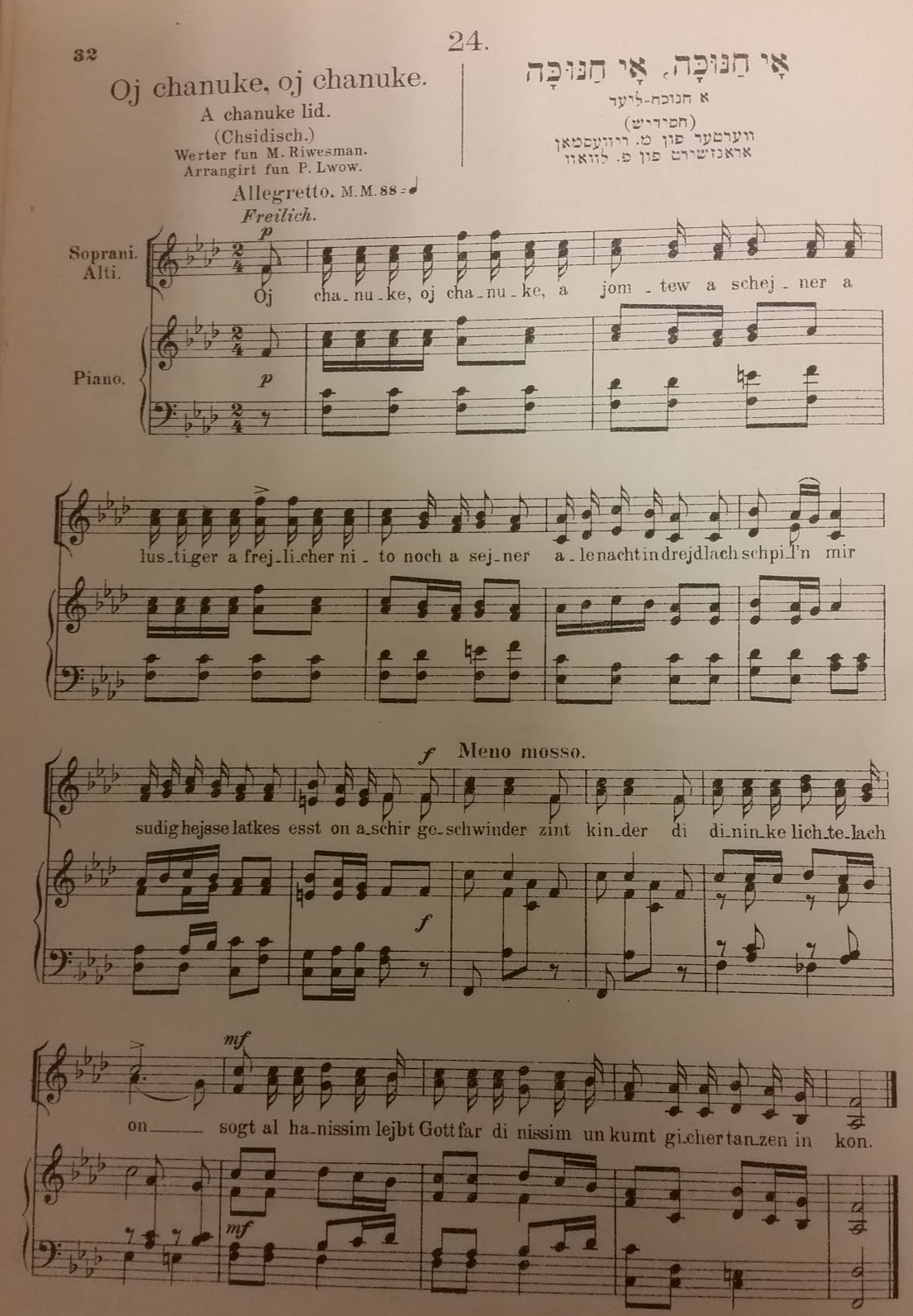 הפרסום הראשון של שירו של מרדכי ריווסמן "חנוכּה, אוי חנוכּה" עם תווים בעיבודו של פסח לבוב (בקובץ לידער-זאַמעלבוך, 1912)